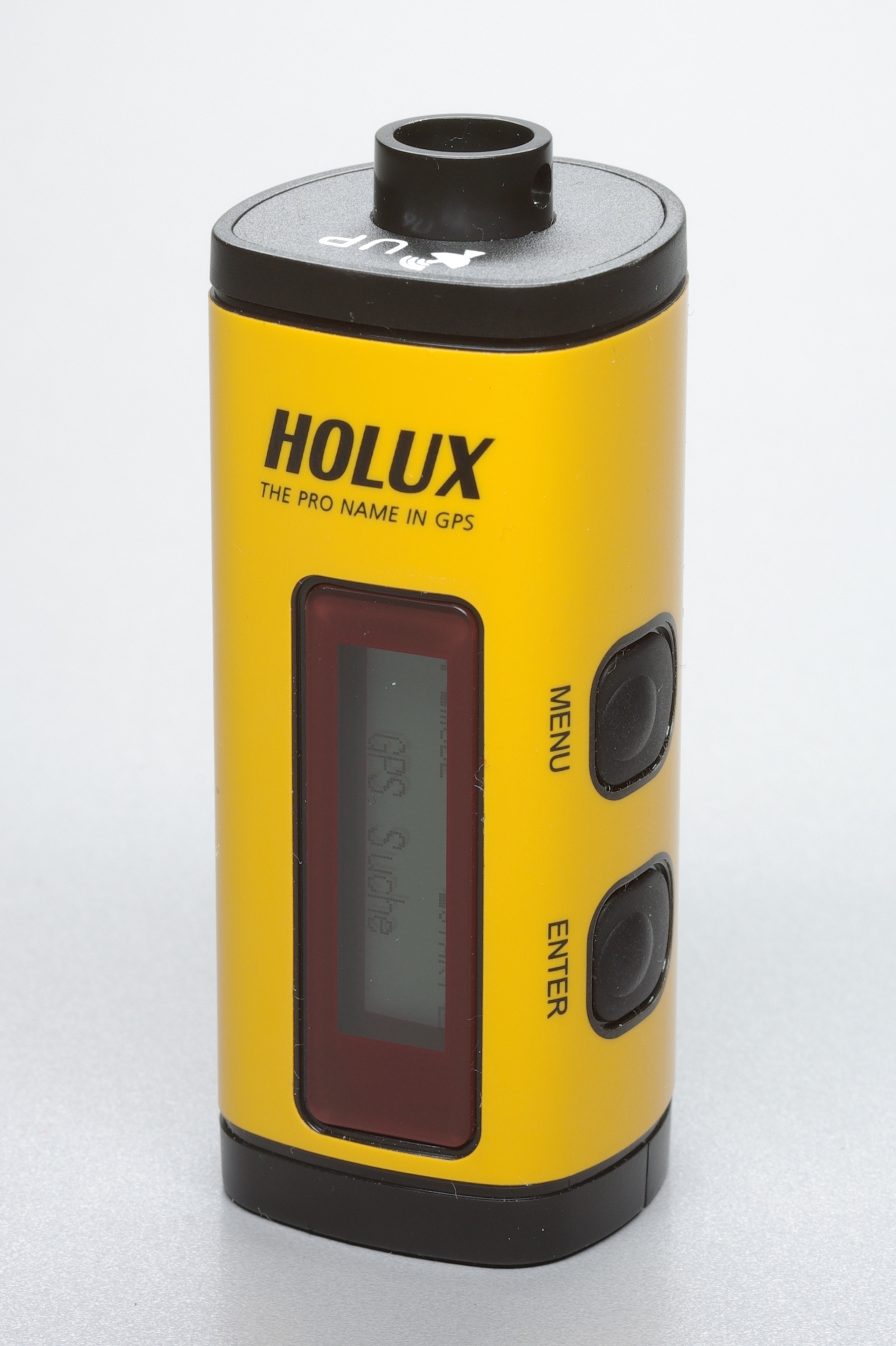 Holux M 241 GPS Datalogger